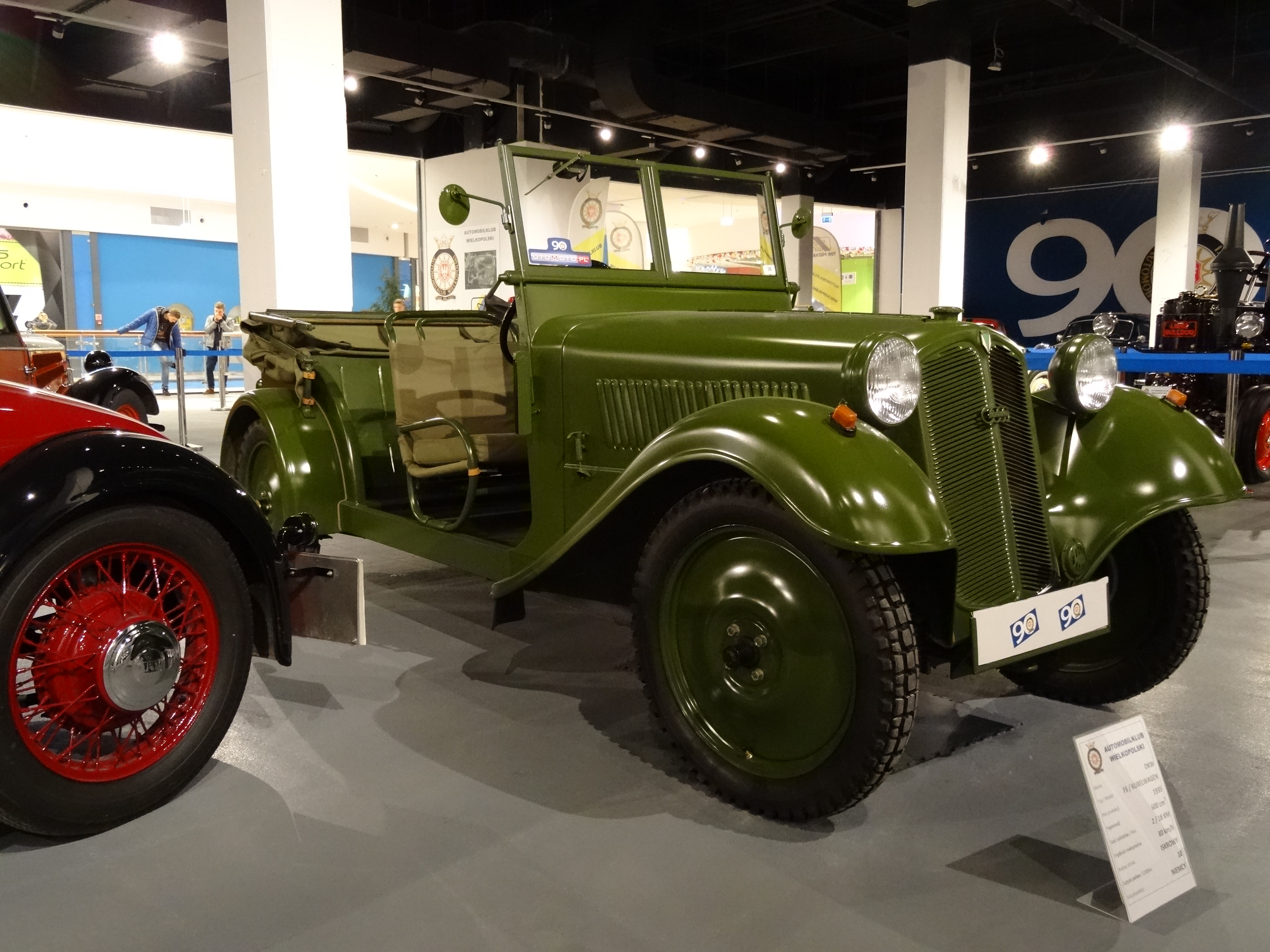 DKW F5 Kubelwagen, Niemcy, 1935 r.